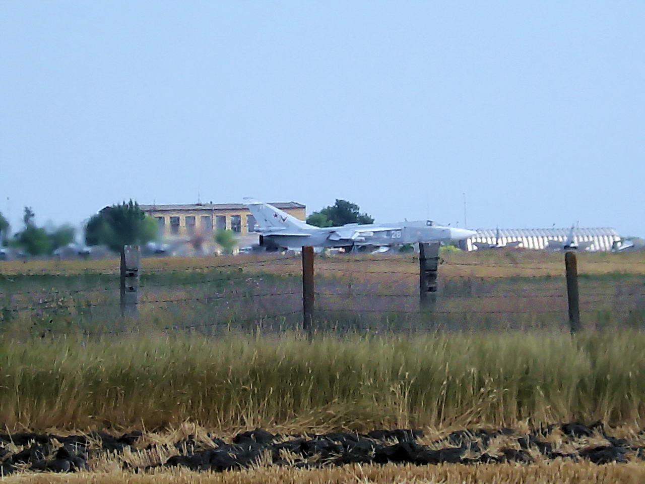 Су-24, 959-ого бомбардировочного авиаполка, на разгоне при взлёте. Аэродром Ейск.